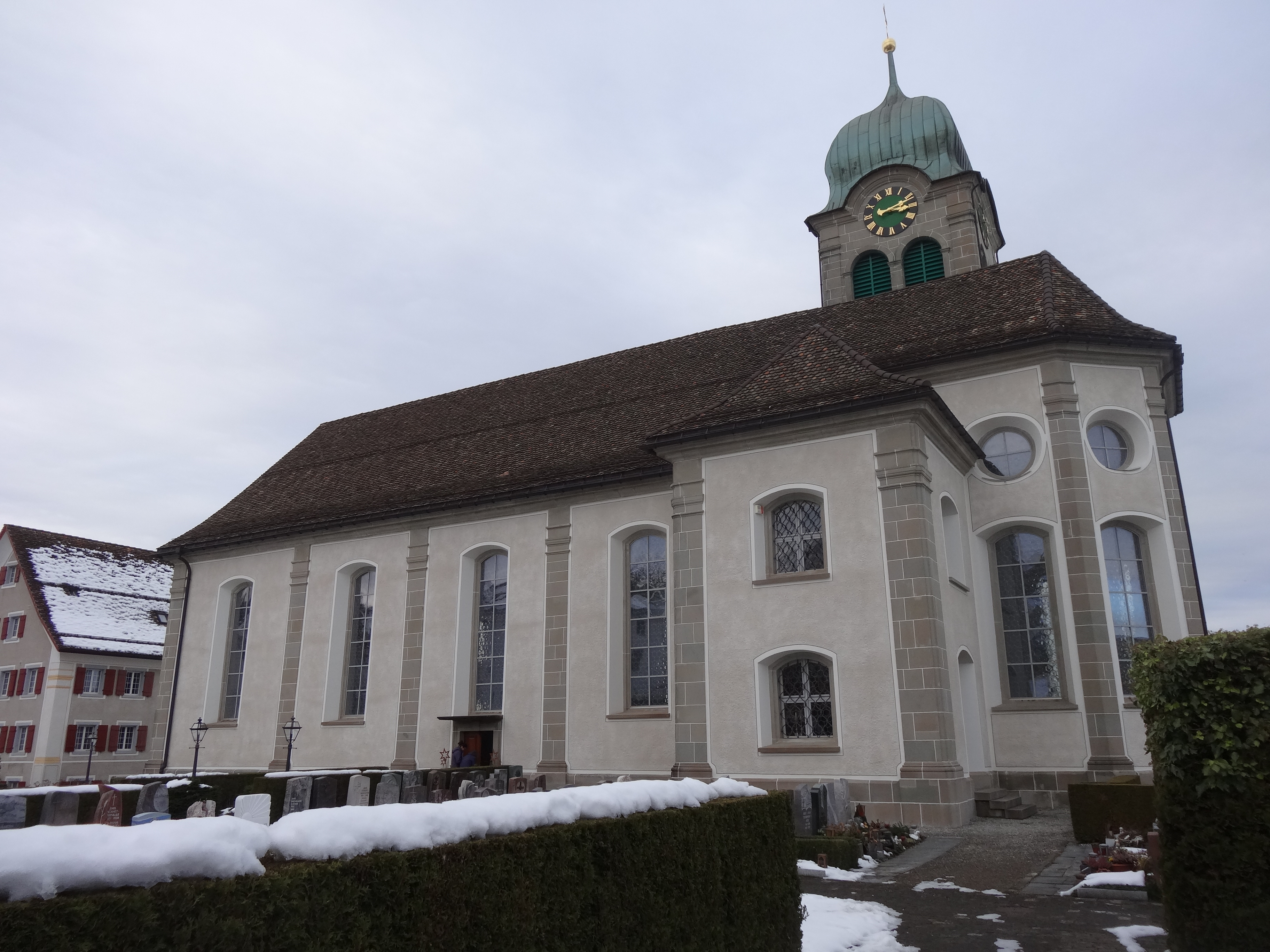 Kath. Pfarrkirche St. Jakobus in Feusisberg (Aussenansicht)